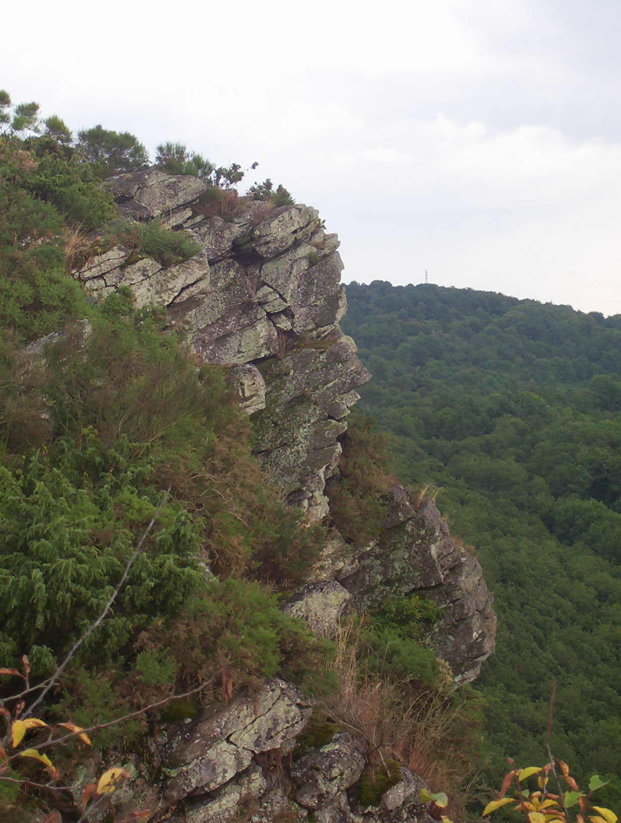 La Roche d'Oëtre, Suisse normande - France